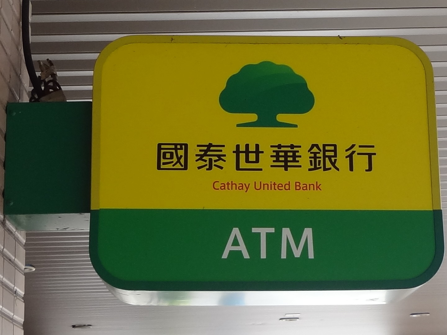 國泰世華銀行自動櫃員機招牌。